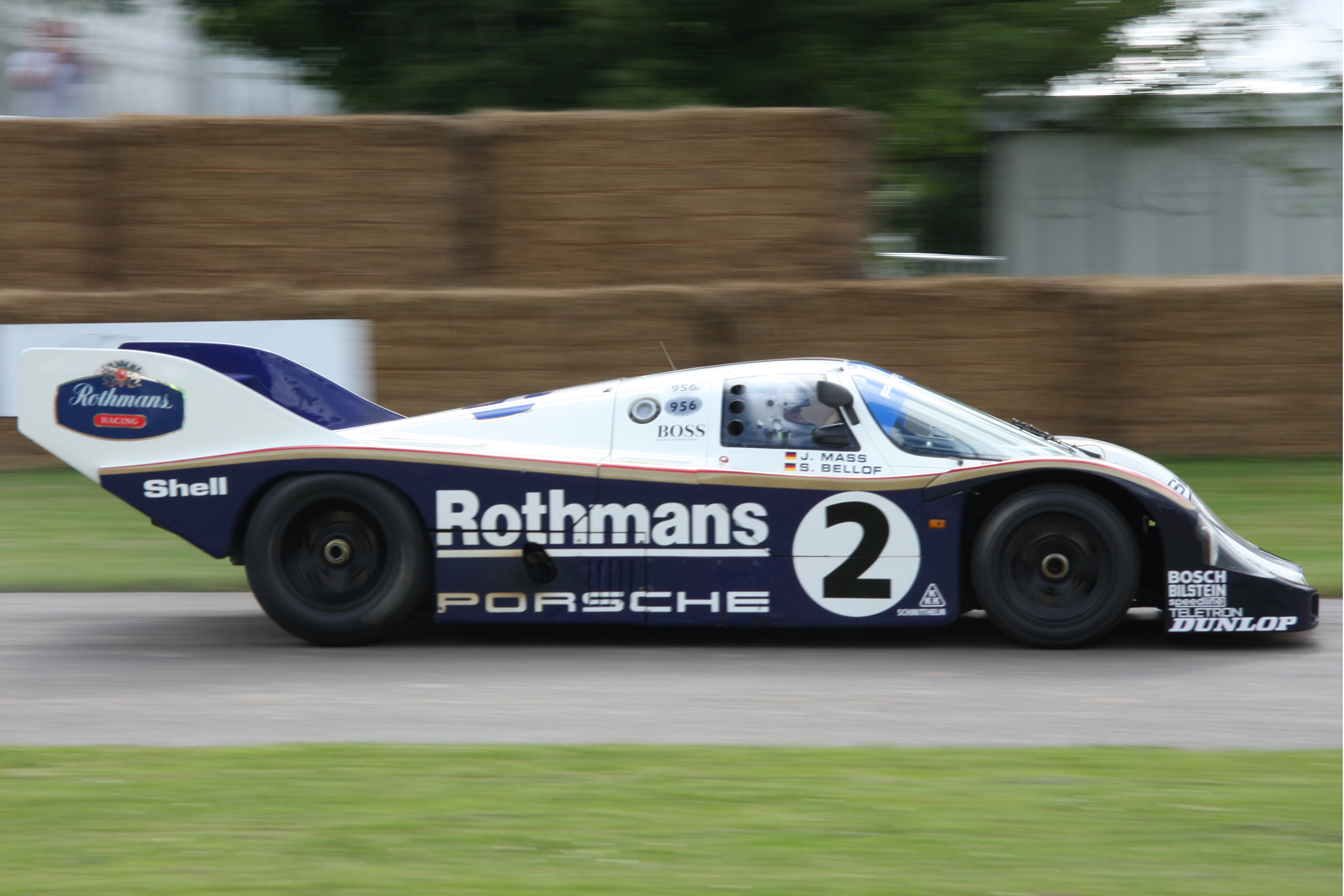 Built 1982. 2.6 litre flat 6